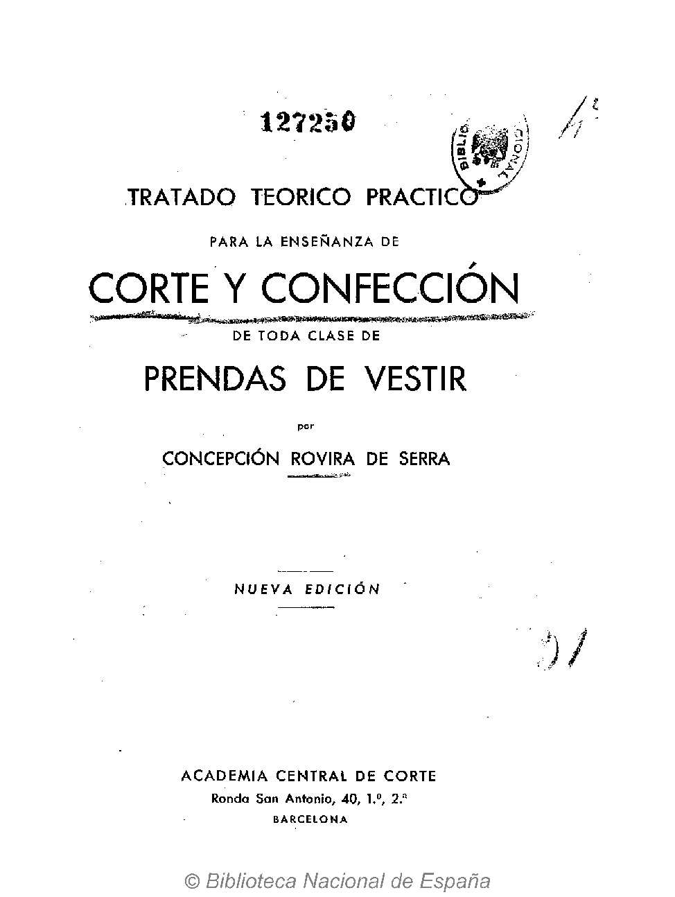 Tratado teórico práctico para la enseñanza del corte y confección de toda clase de prendas de vestir por Concepción Rovira de Serra Autora: Rovira de Serra, Concepción Fecha: 1936 Datos de edición: Barcelona, Academia Central de Corte